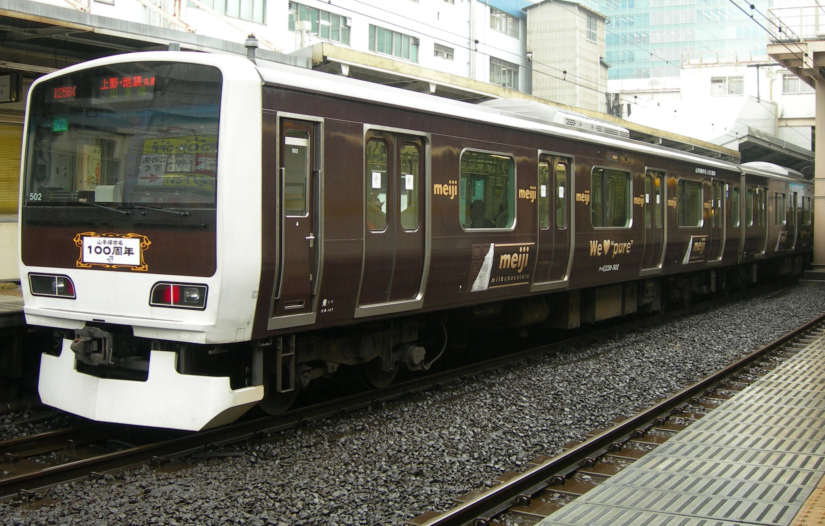 山手線用E231系500番台 秋葉原で撮影